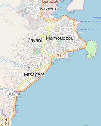 Map Mamoudzou